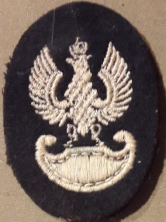 Orzełek 1 Pułku Ułanów Krechowieckich odtworzonego w 2 Korpusie Polskim